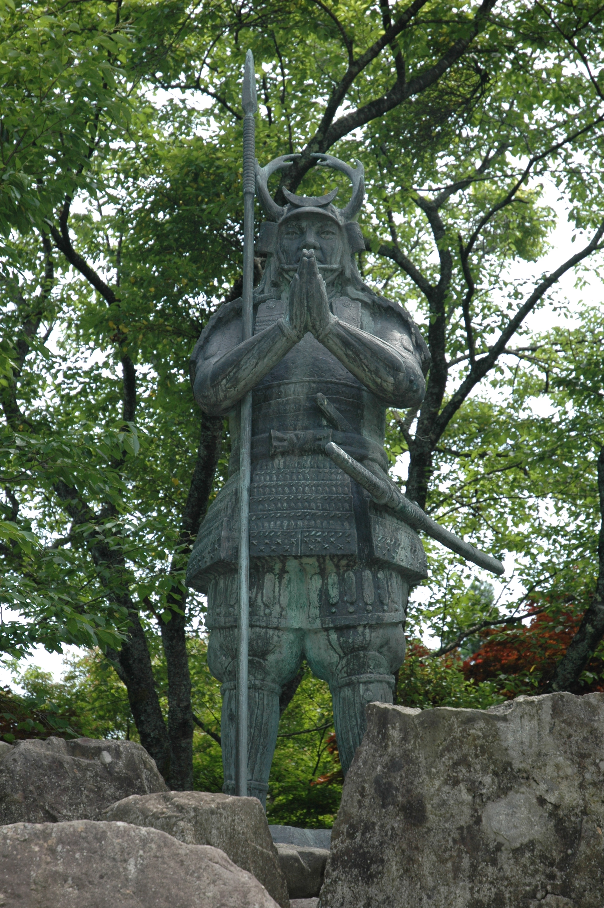 Statue of Yamanaka Shikanosuke in Gassan Toda castle